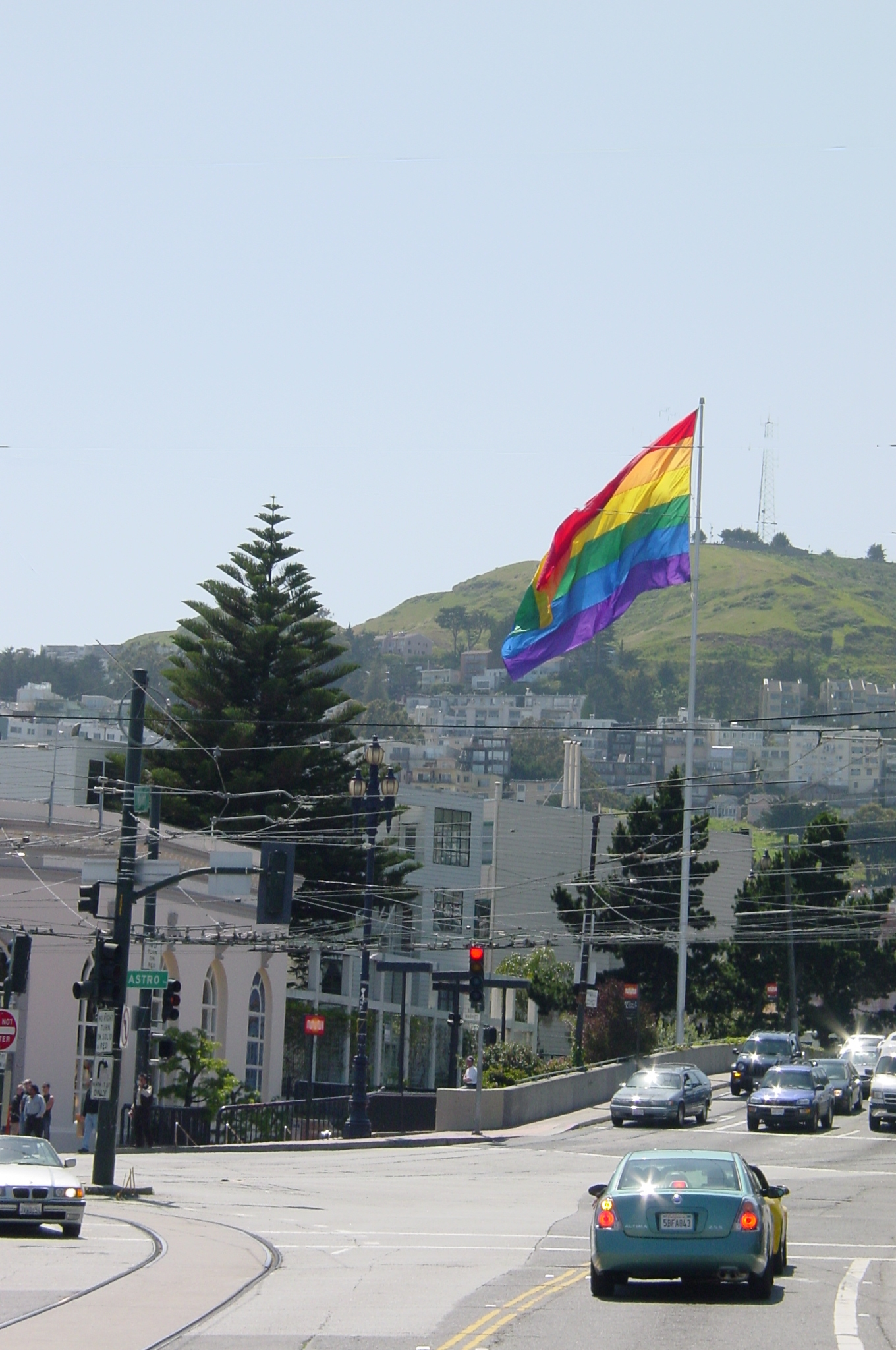 angle Castro-Market San Francisco, Californie, États Unis d'Amérique